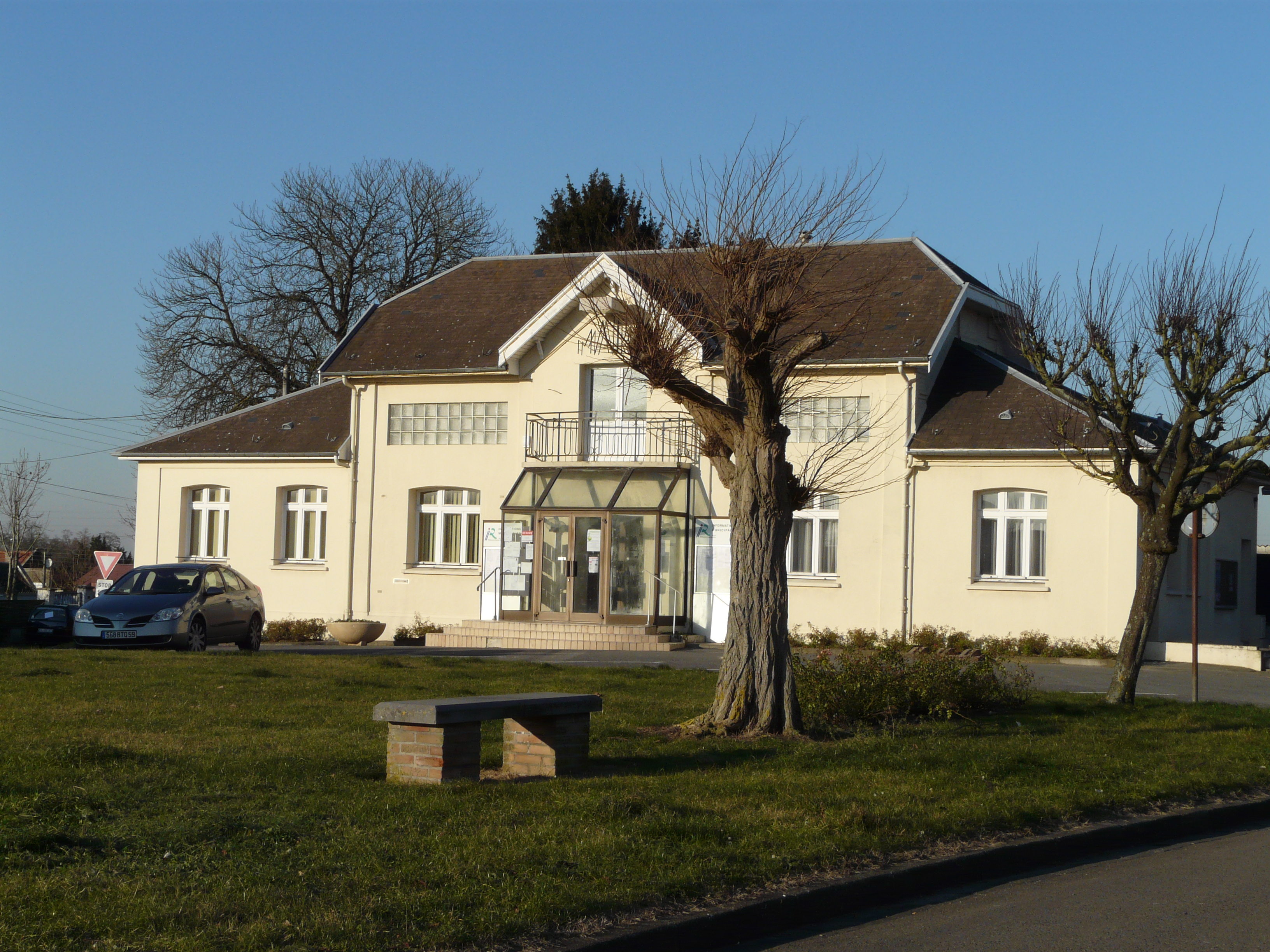 La mairie de raillencourt-Sainte-Olle